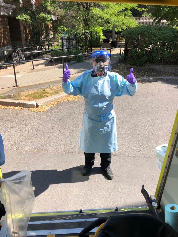 Le paramédic Daniel Rousseau en habit de protection contre la Covid-19 (Montréal, juin 2020). Le masque est un P100 #6200 avec des filtres 7093 fabriqué par 3M.